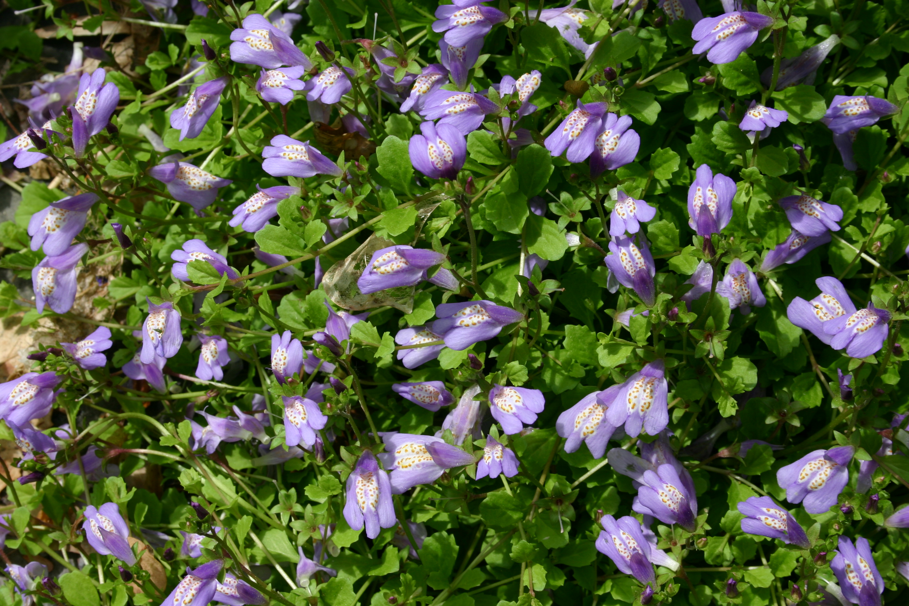 Mazus reptans